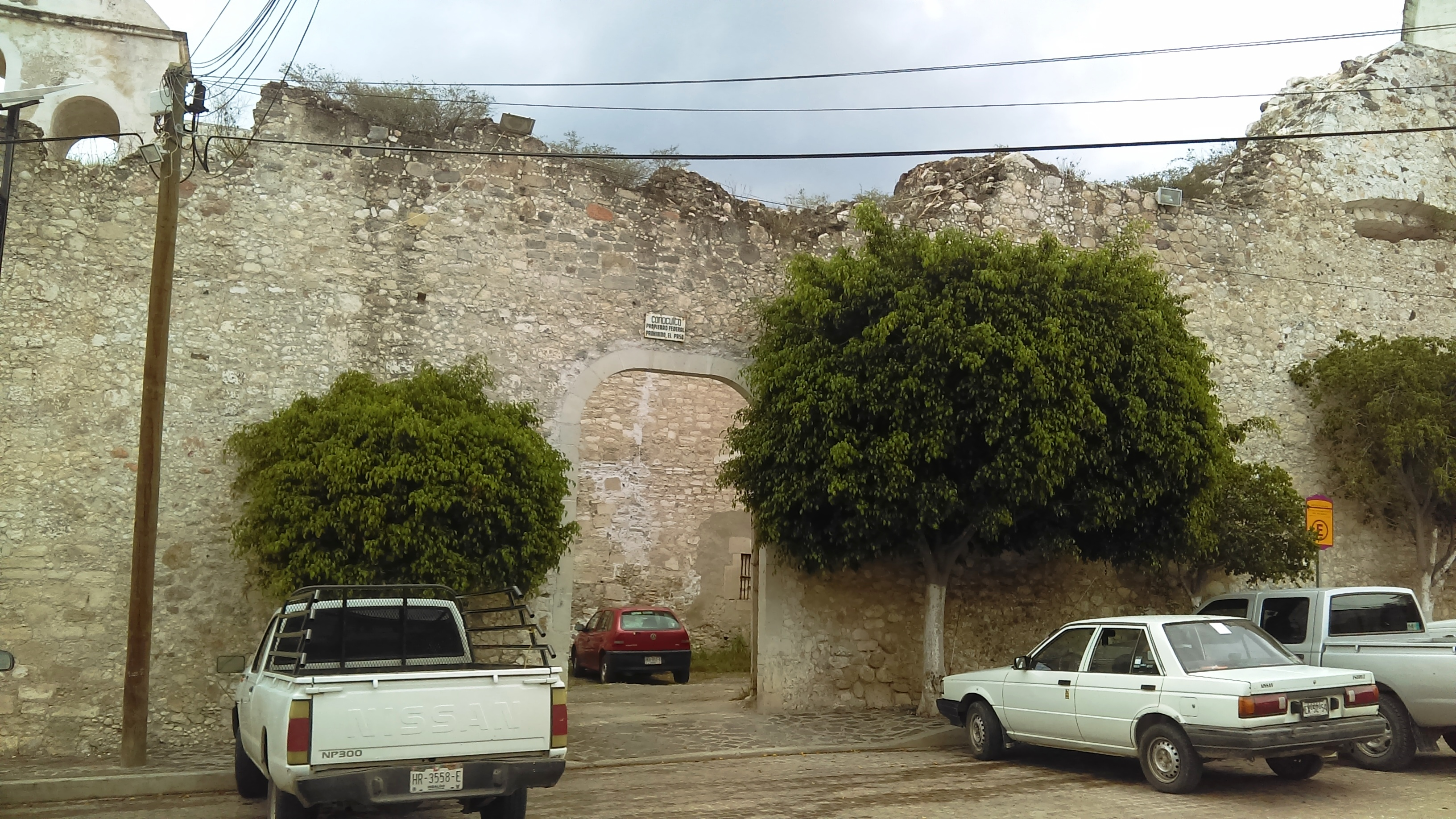 Edifico La Comunidad en Metztitlán, Hidalgo, México.